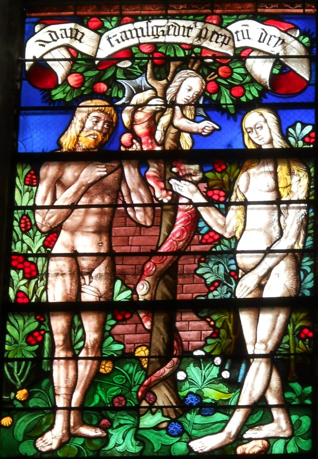 Châlons-en-Champagne, Kathedrale St-Etienne, Detail aus dem Schöpfungsfenster